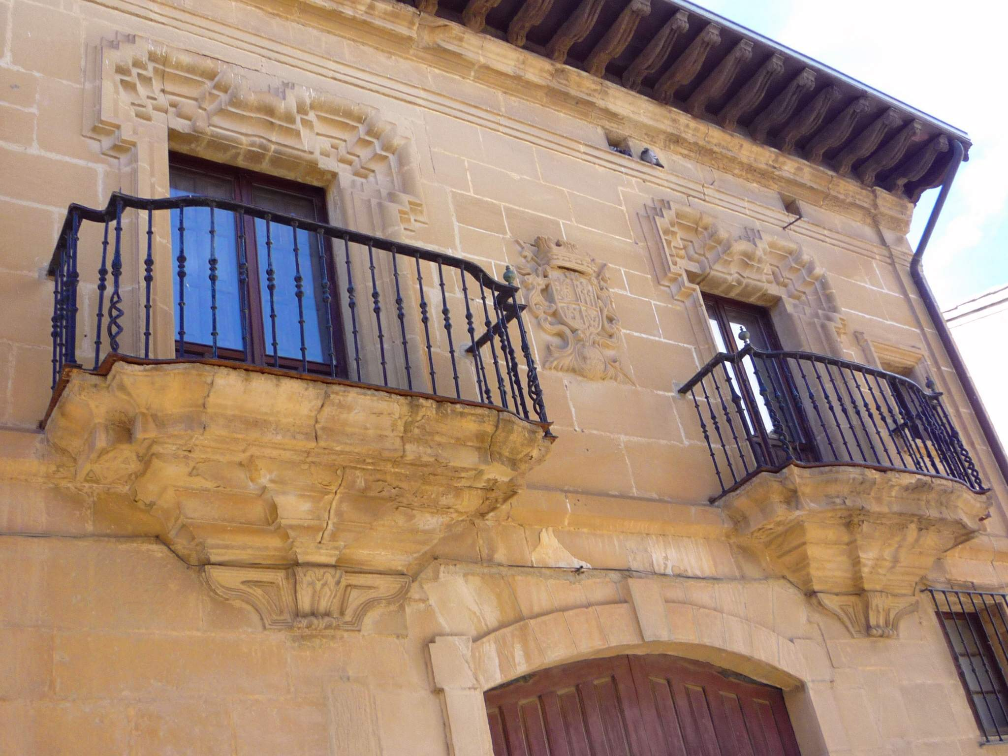 Palacio del Conde de Portalegre (Ollauri, La Rioja)